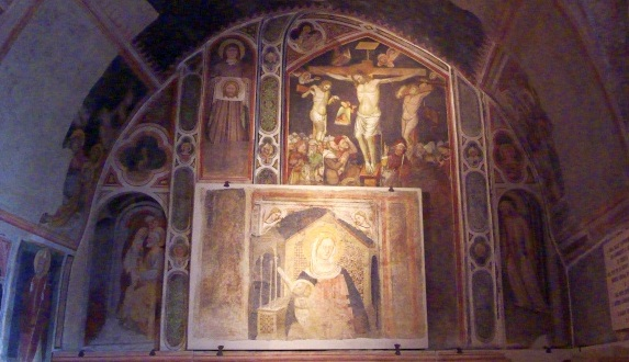 Treviso, Chiesa di Santa Lucia: Cappella della Crocifissione, affresco della Madonna del "pavejo". XIV sec.